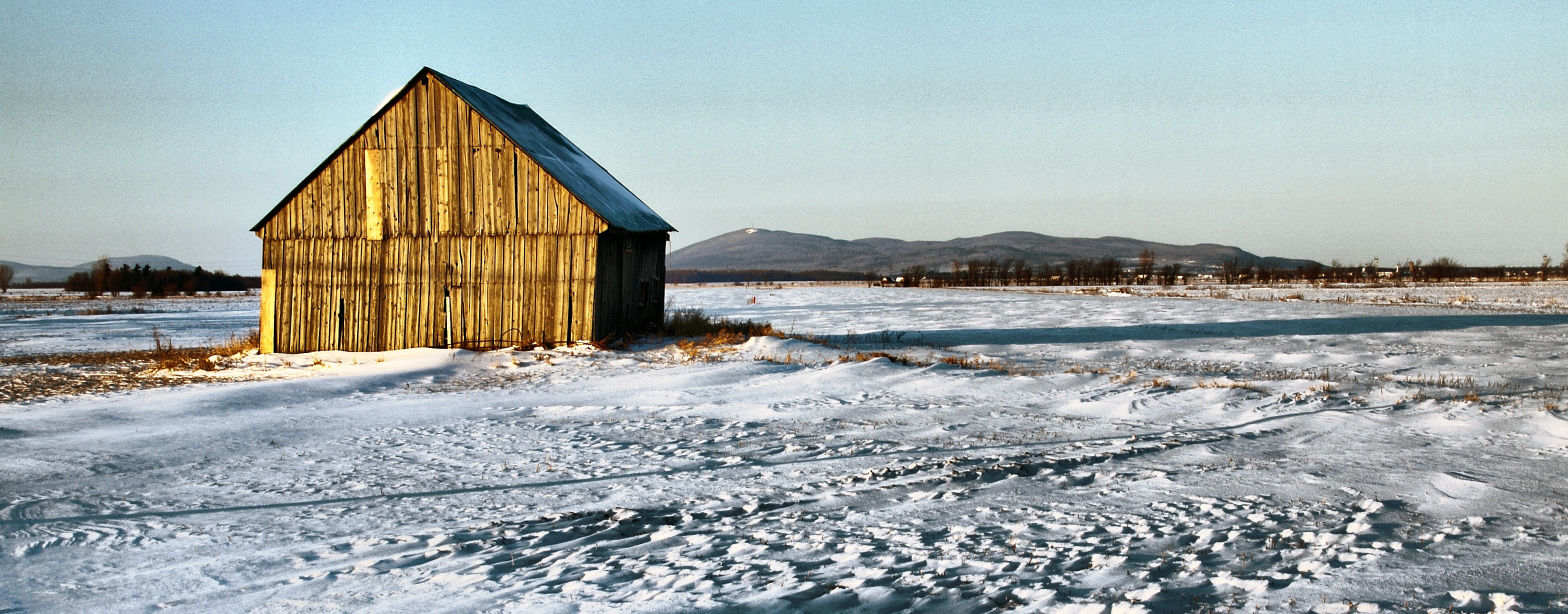 Sainte-Brigide-d'Iberville - Vieille grange. En fond de paysage, le mont Yamaska